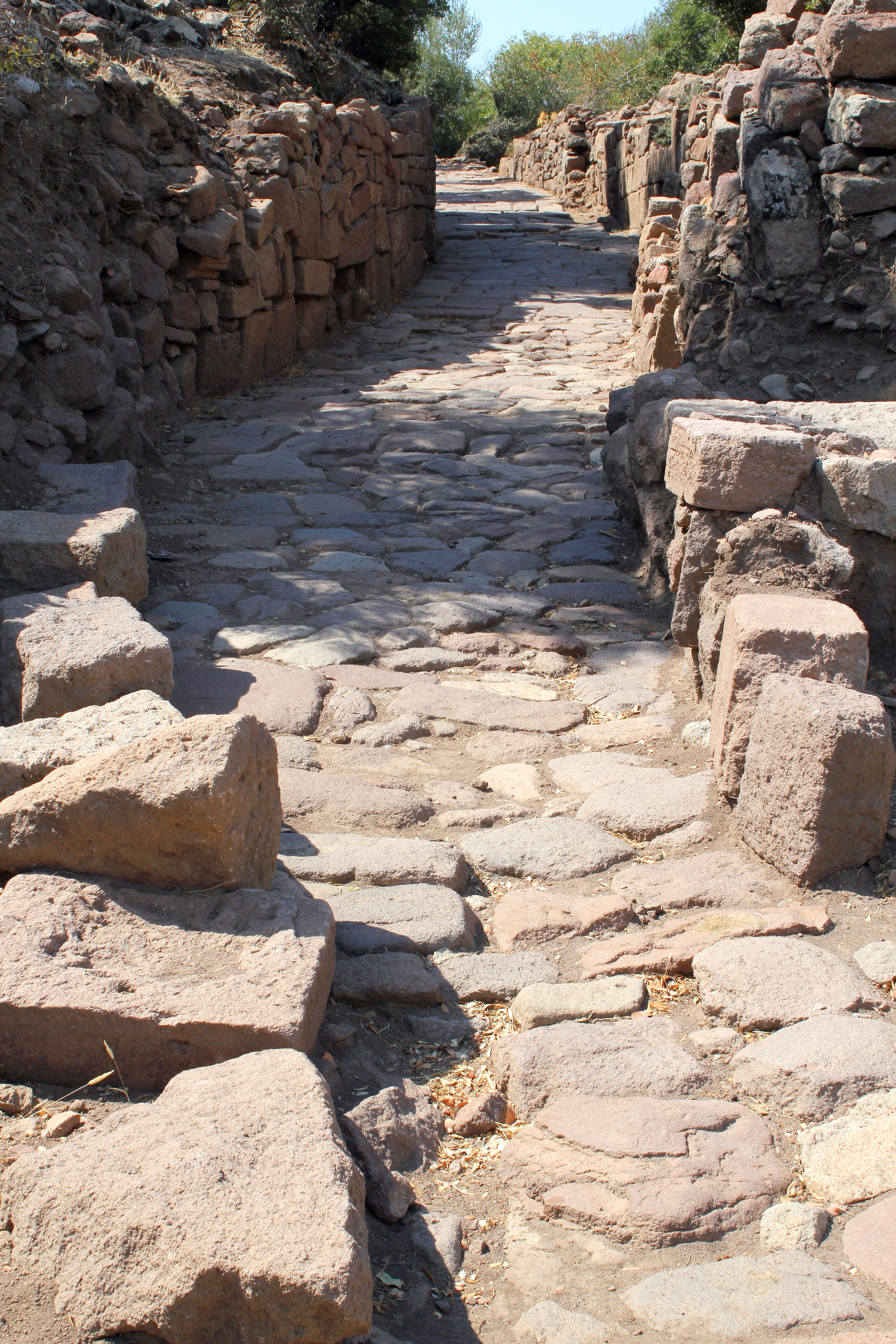 Antike Pflasterung beim Aufstieg in Aigai (Äolis), Westtürkei